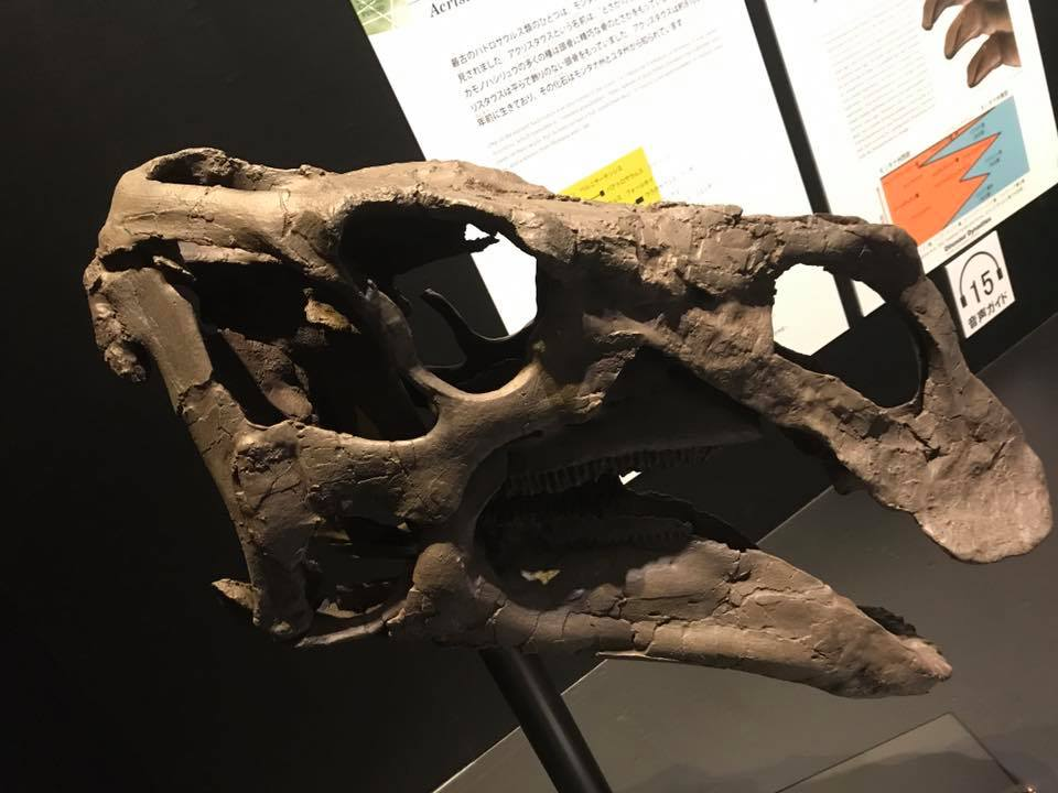 アクリスタヴス頭骨